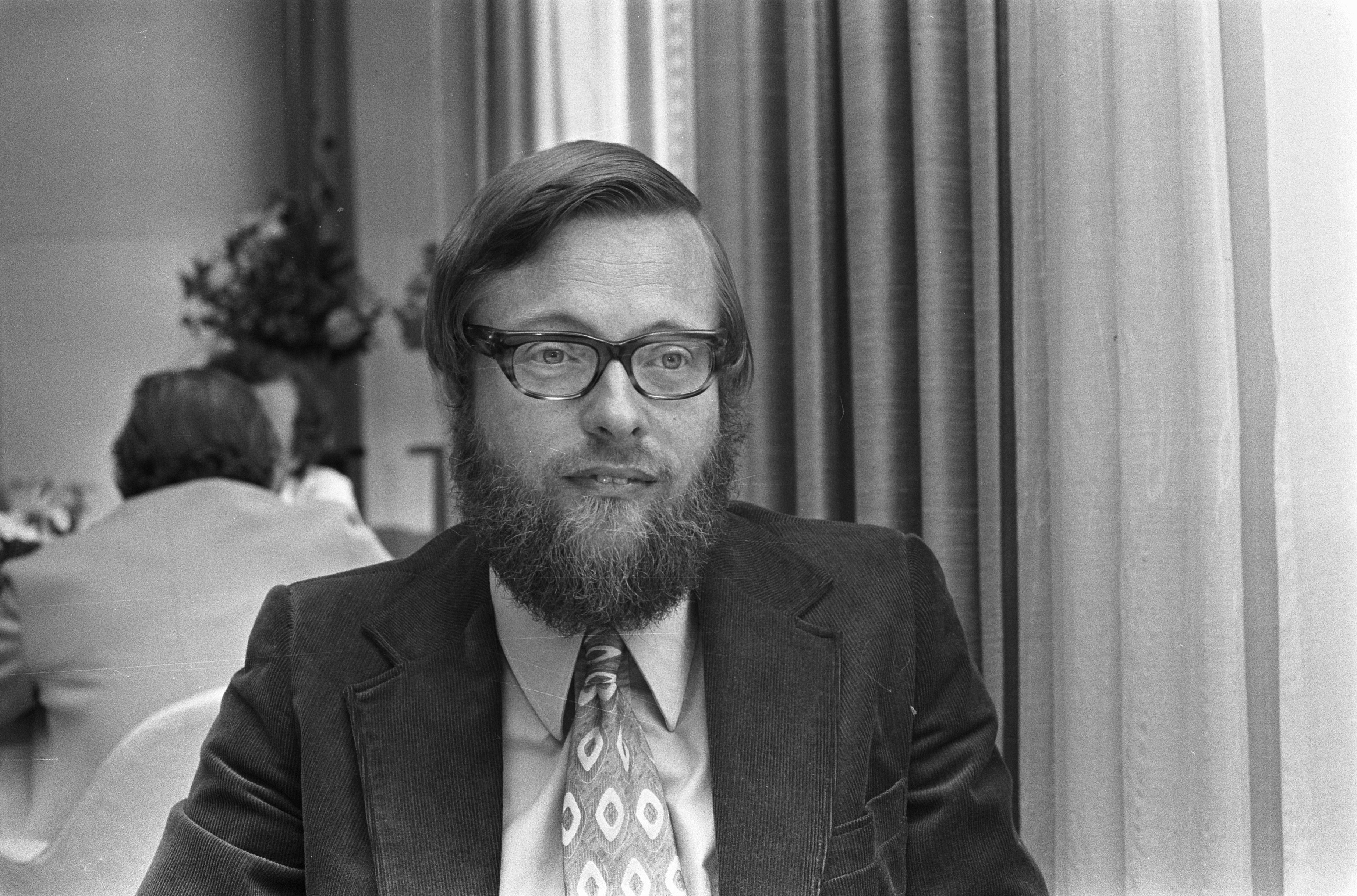 Collectie / Archief : Fotocollectie Anefo Reportage / Serie : [ onbekend ] Beschrijving : Tweede Kamer debatteert over radio-piraten-zenders (uitvoering verdrag van Straatsburg), prof. dr. J. van den Doel (PvdA) Datum : 26 juni 1973 Locatie : Den Haag, Zuid-Holland Trefwoorden : kamerleden, parlementaire debatten, politiek, portretten Persoonsnaam : Doel, Hans van den Instellingsnaam : PvdA, Tweede Kamer Fotograaf : Mieremet, Rob / Anefo Auteursrechthebbende : Nationaal Archief Materiaalsoort : Negatief (zwart/wit) Nummer archiefinventaris : bekijk toegang 2.24.01.05 Bestanddeelnummer : 926-5112